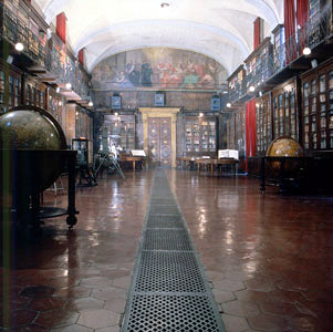 Istituto geografico militare, biblioteca